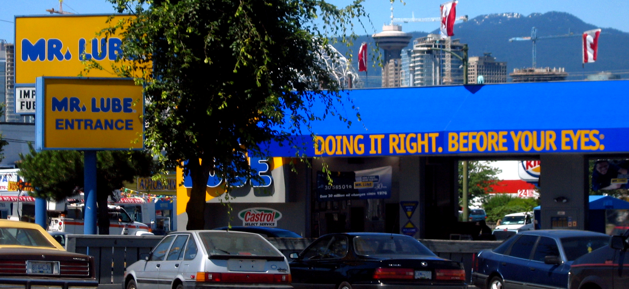 Mr. Lube